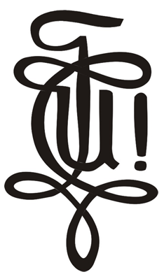 Korporatsioon Ugala sirkel